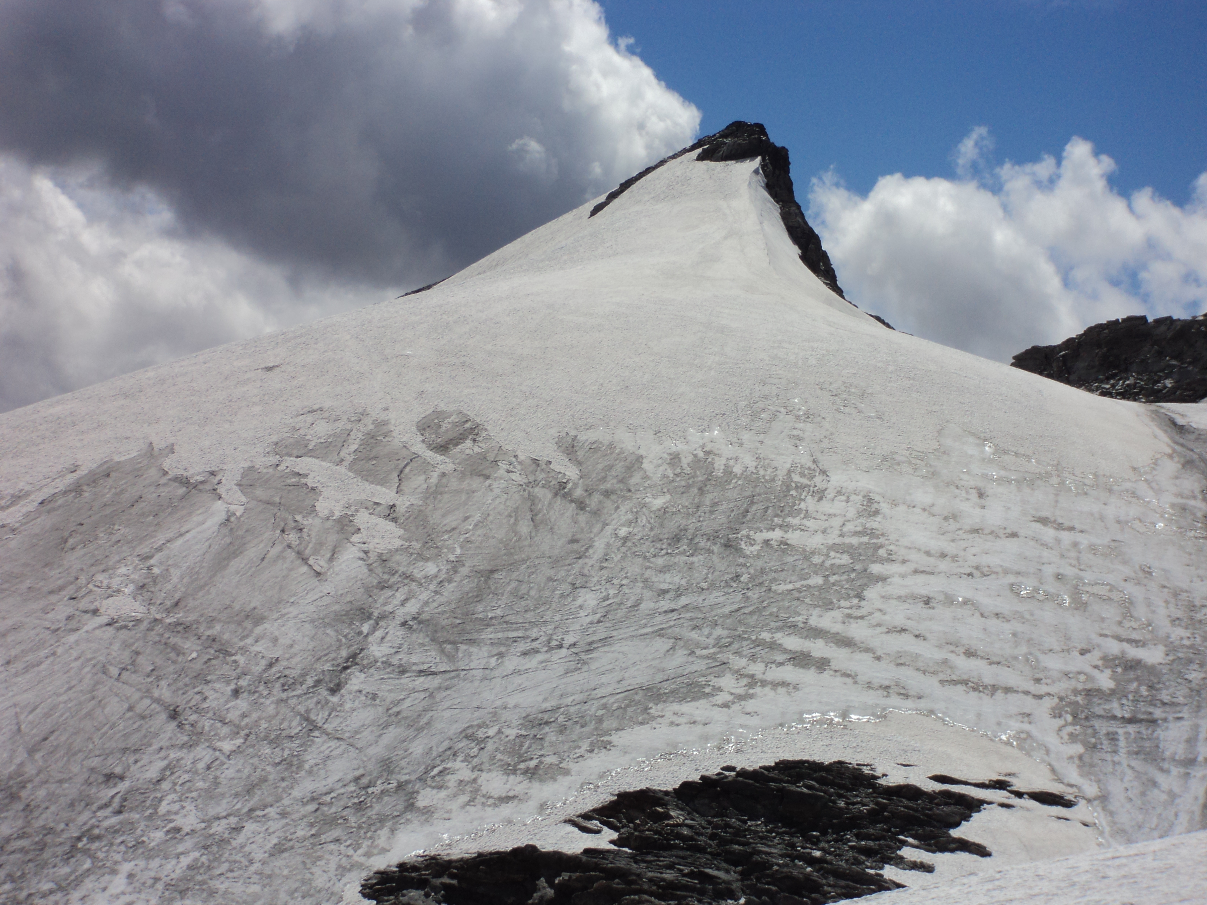 Il Breithorn del Sempione visto dal Breithornpass